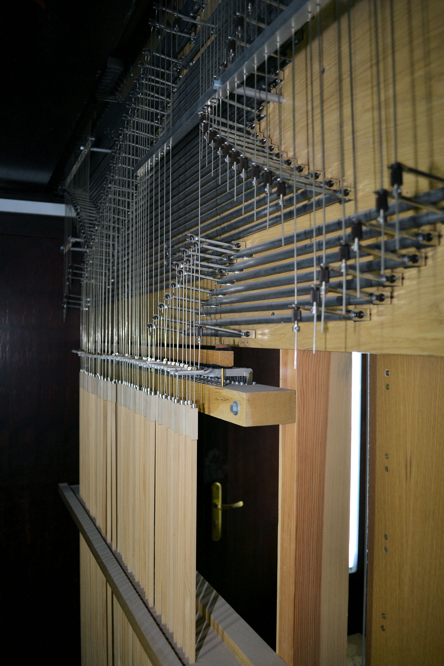 Bazylika archikatedralna św. Jakuba w Szczecinie - organy